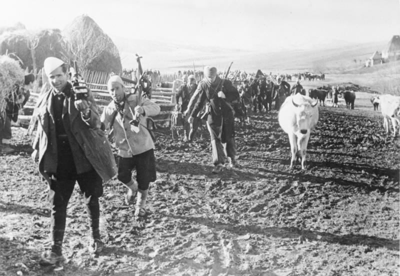 63252 Bandenkampf in Bosnien. Kroatische Legionäre, darunter viele Muselmanen kämpfen auf deutscher Seite gegen Tito-Banden. Hier treten die Männer eines Dorfes an, ihre Heimat gegen die Banden zu verteidigen. PK-Aufn.Kriegsber.Thiede HH 13-1-44 [Herausgabdatum]